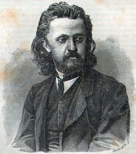 Vasily Kelsiev